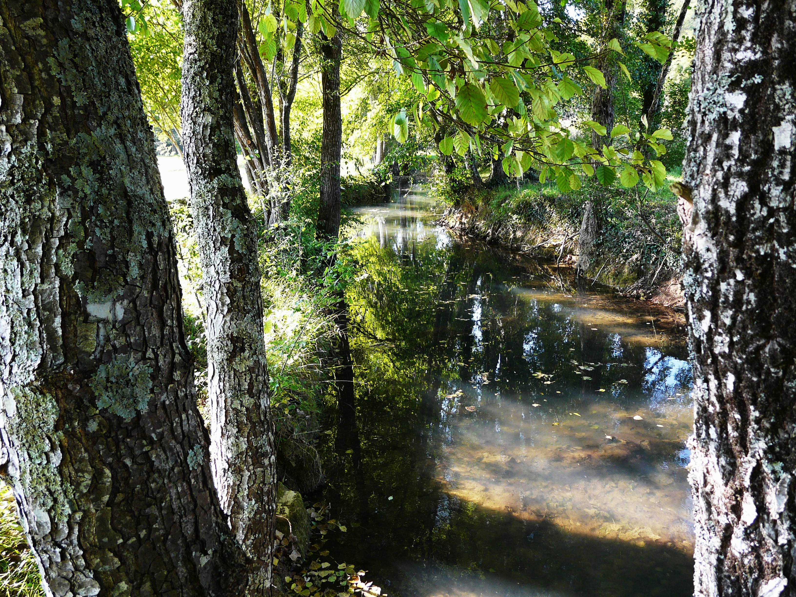 La Louyre, Liorac-sur-Louyre, Dordogne, France